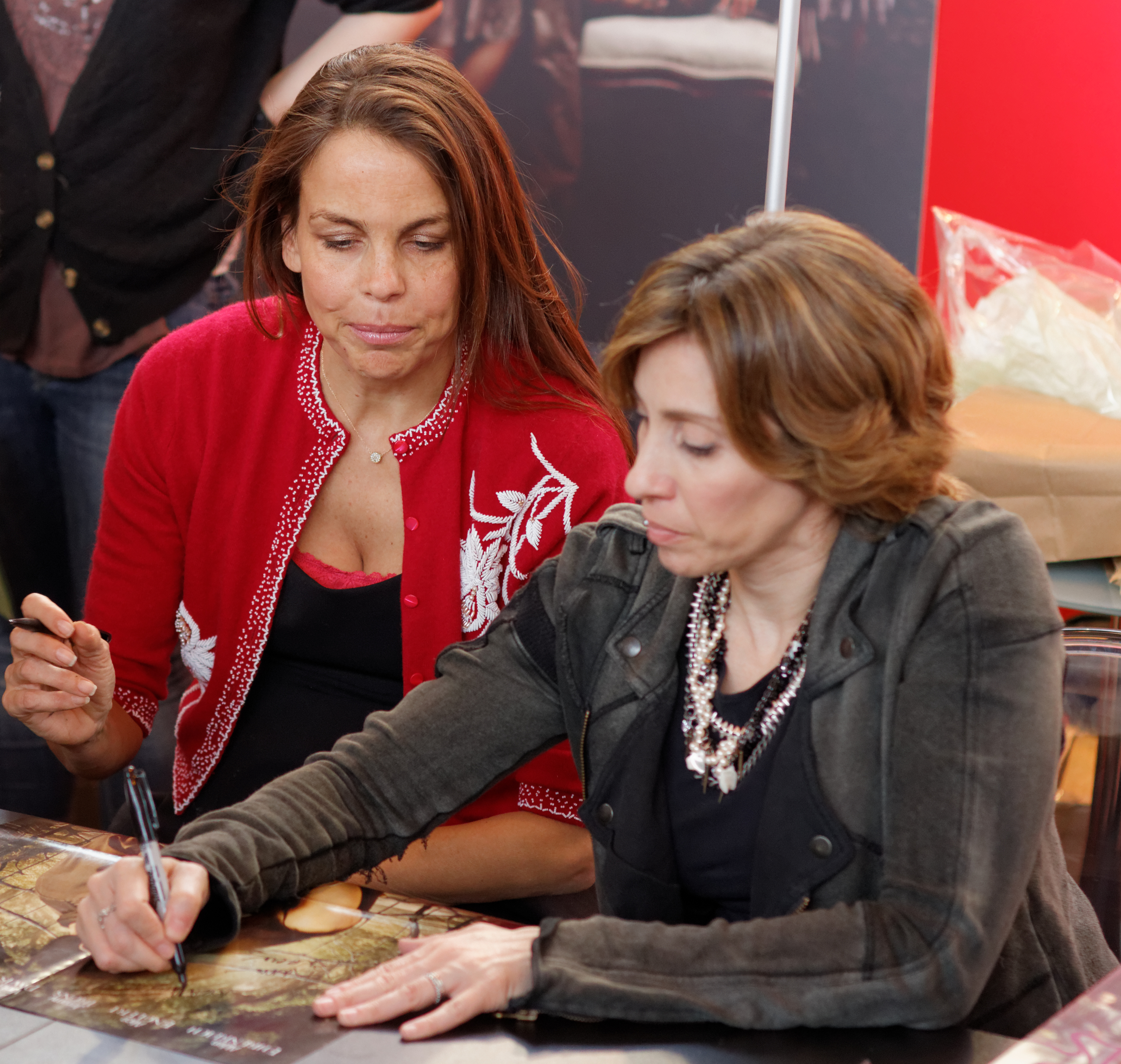 Kami Garcia, Margaret Stohl, salon du livre de Paris, 2013